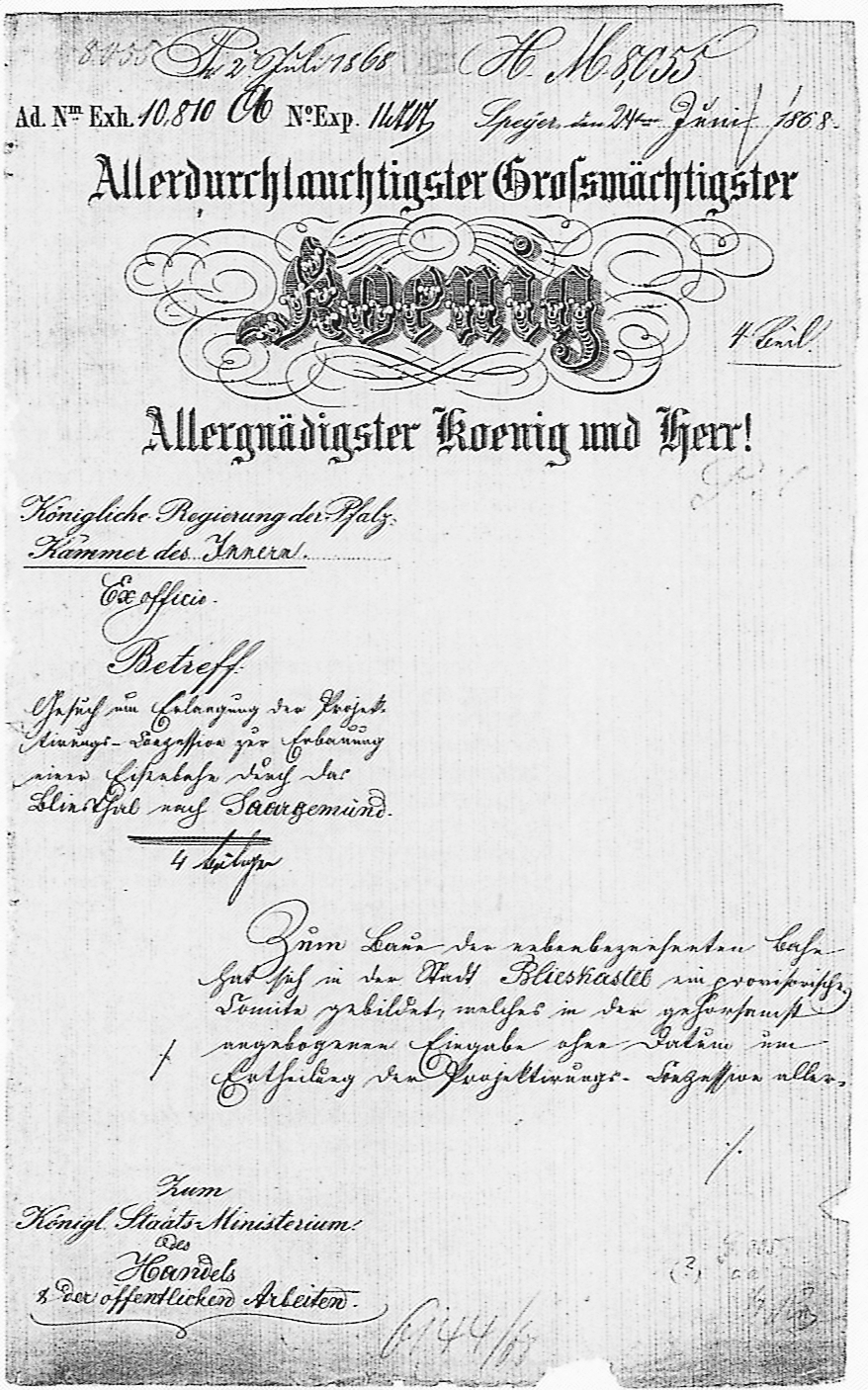 Gesuch um Erlangung der Projectierungc-Concession zur Erbauung einer Eisenbahn durch das Bliesthal nach Saargemünd --- 4 Beilagen